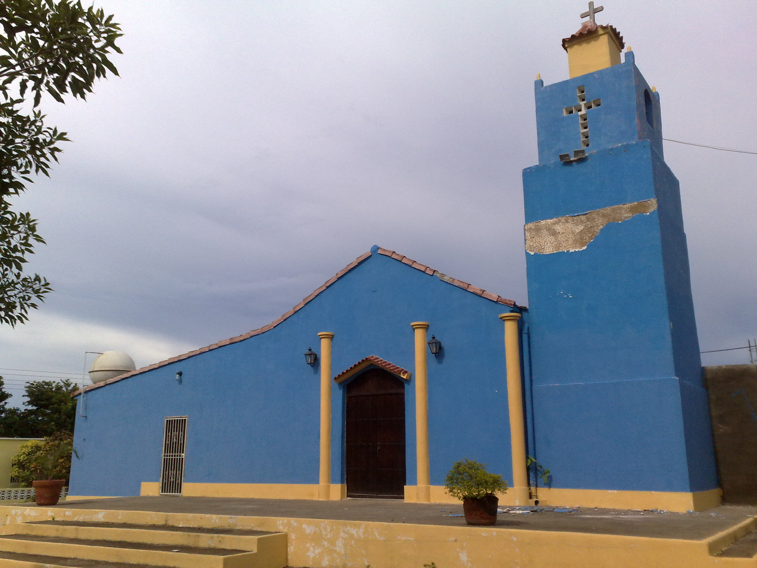 Iglesia de Tocópero.